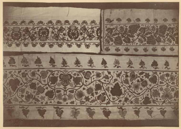 Старовинні вишивки подолів жіночих сорочок з Київської губернії.